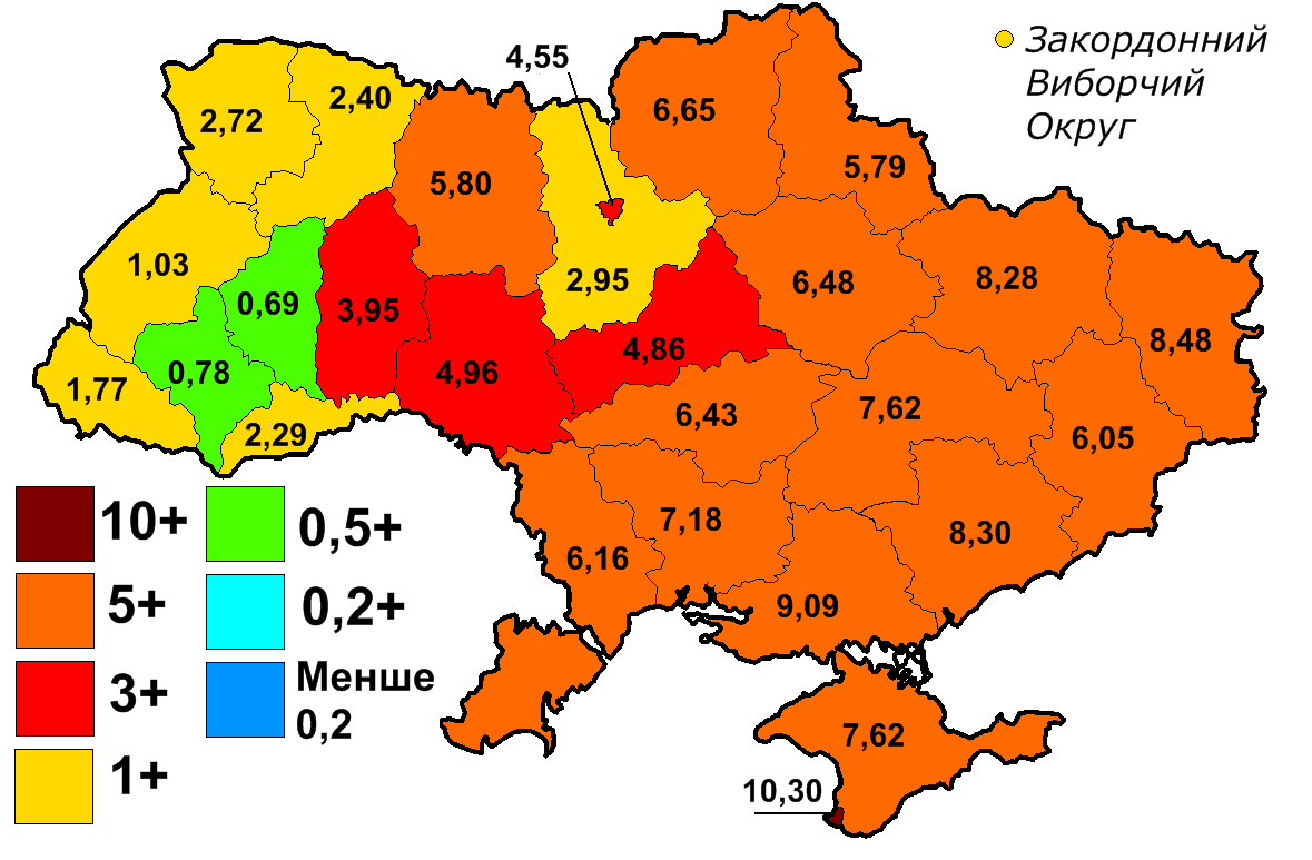 Вынікі Камуністычнай партыі Ўкраіны на выбарах 2007 году